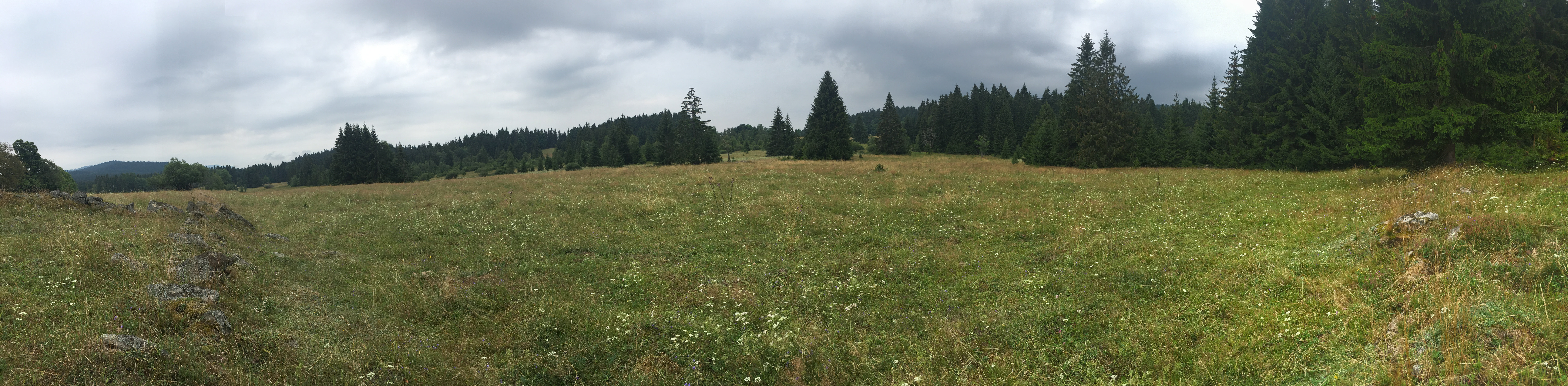 Pohled od bývalého čp 24 (Pechman) směrem k hlavní cestě (Grosskopf, Jakschi)